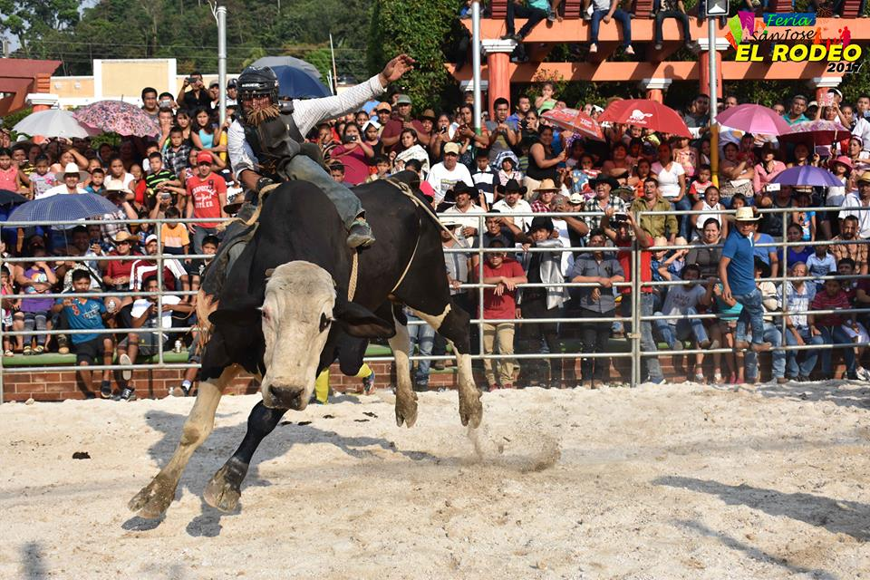 Jinete de toros en el rodeo